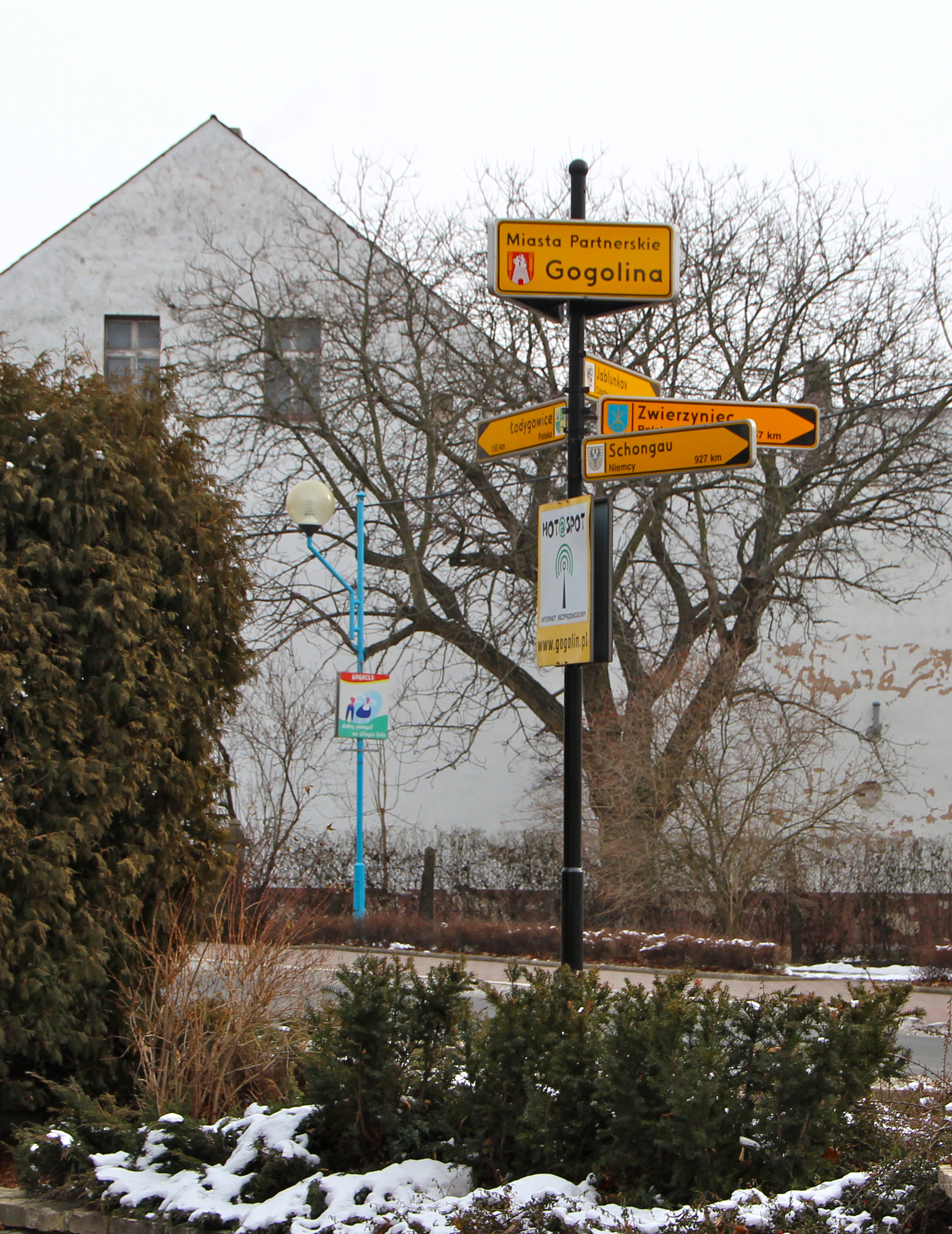 Gogolin – miasto w woj. opolskim, w powiecie krapkowickim, siedziba władz gminy miejsko-wiejskiej Gogolin.